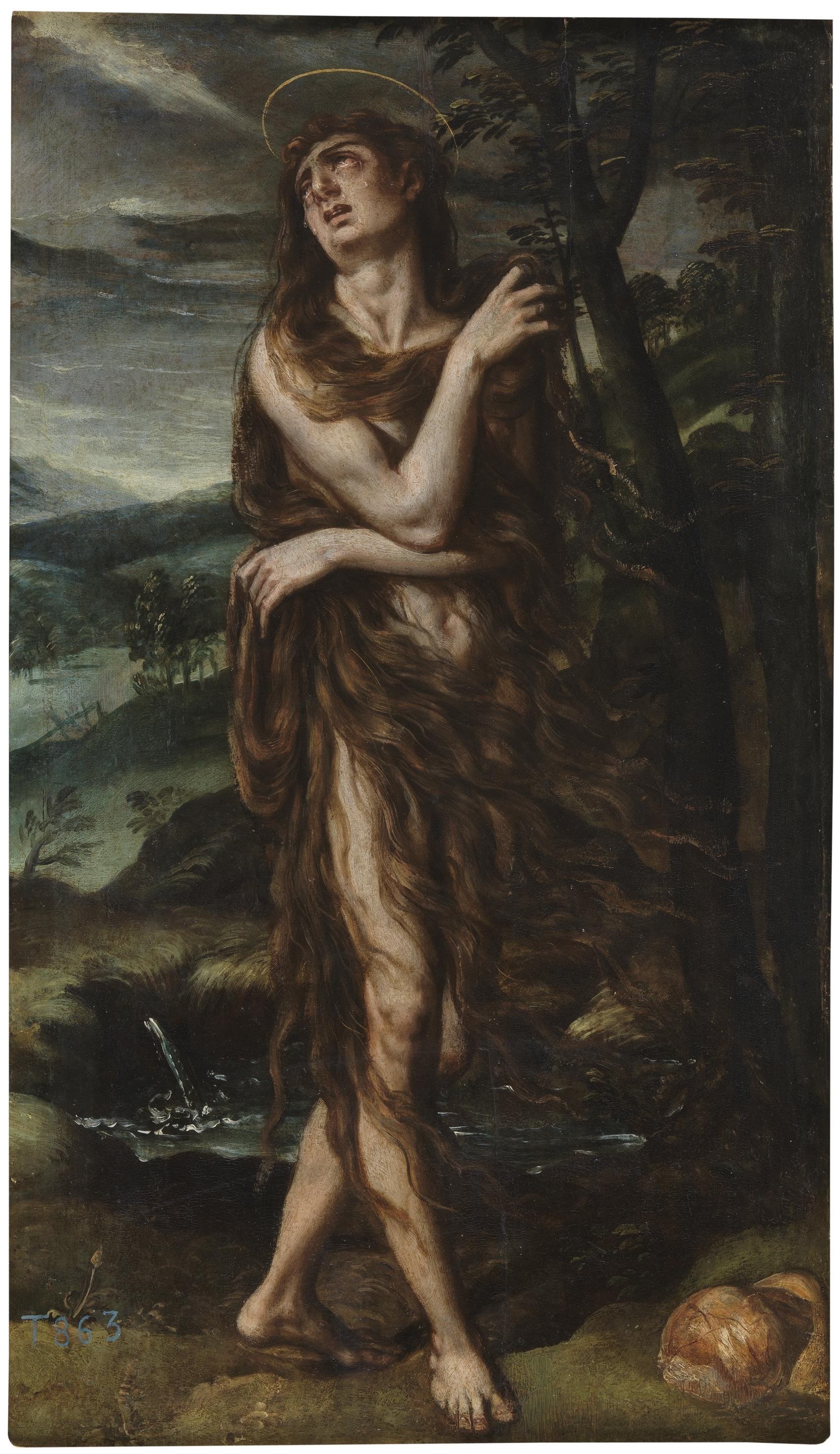 El lienzo muestra a María Magdalena, una de las discípulas de Cristo, en actitud penitente.